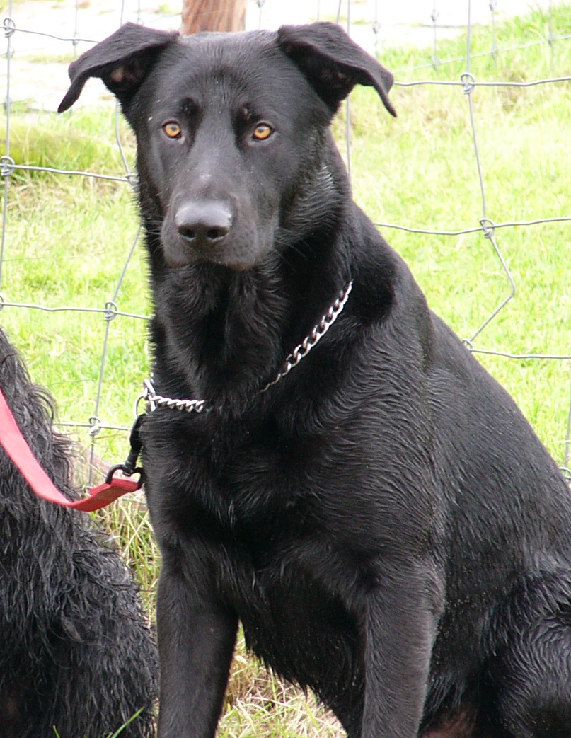 Ca_de_Bestiar Gespendet von